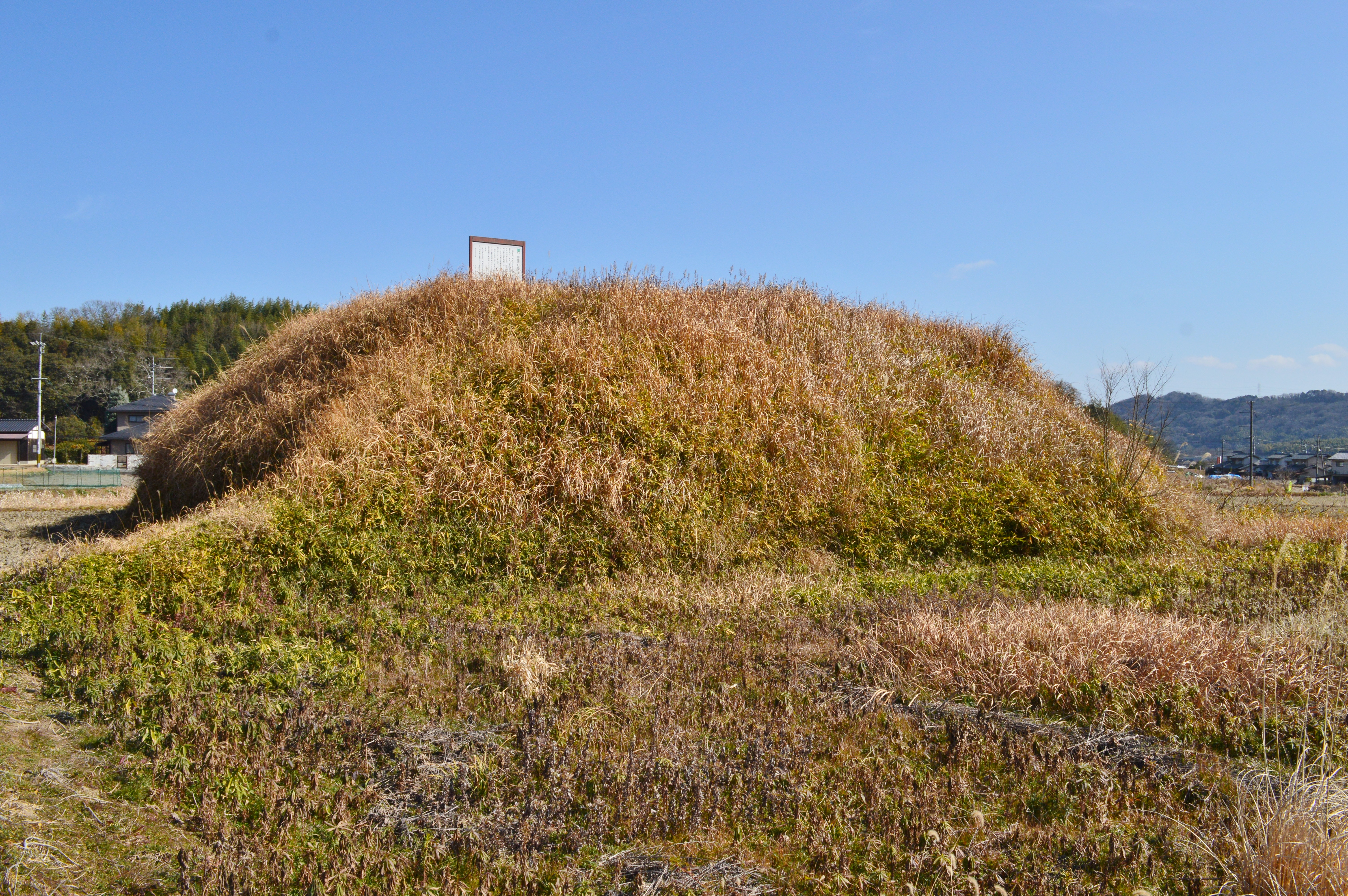 和田茶臼山古墳 墳丘全景 Nikon D3200